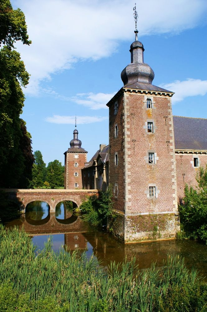 De voorburcht van kasteel Neubourg te gulpen.